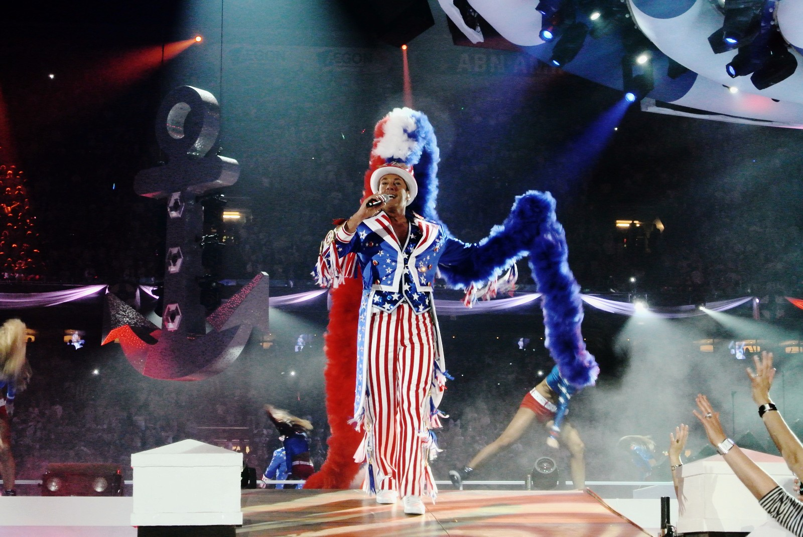 Gerard Joling in 2012